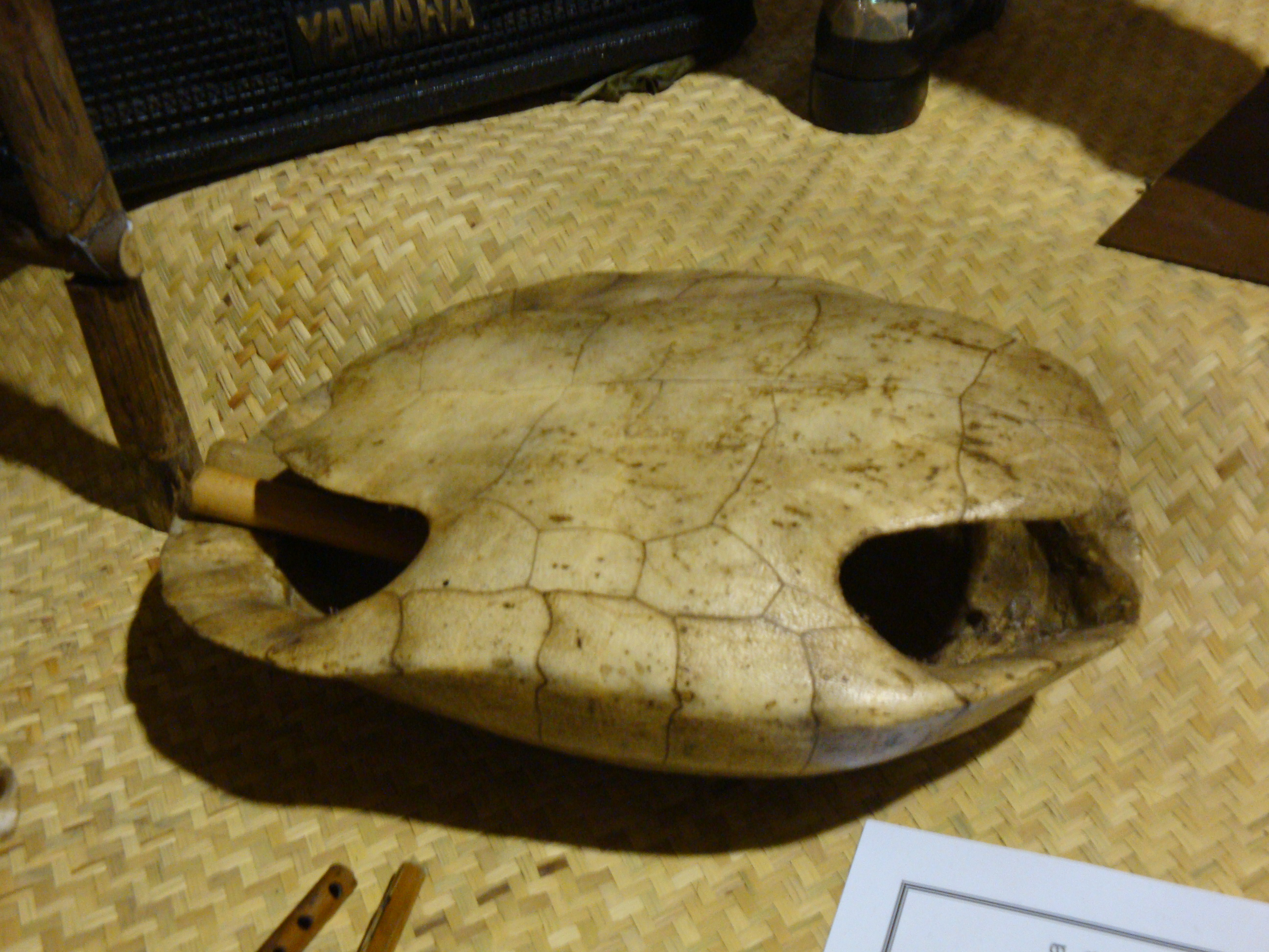 Caparazon de tortuga.